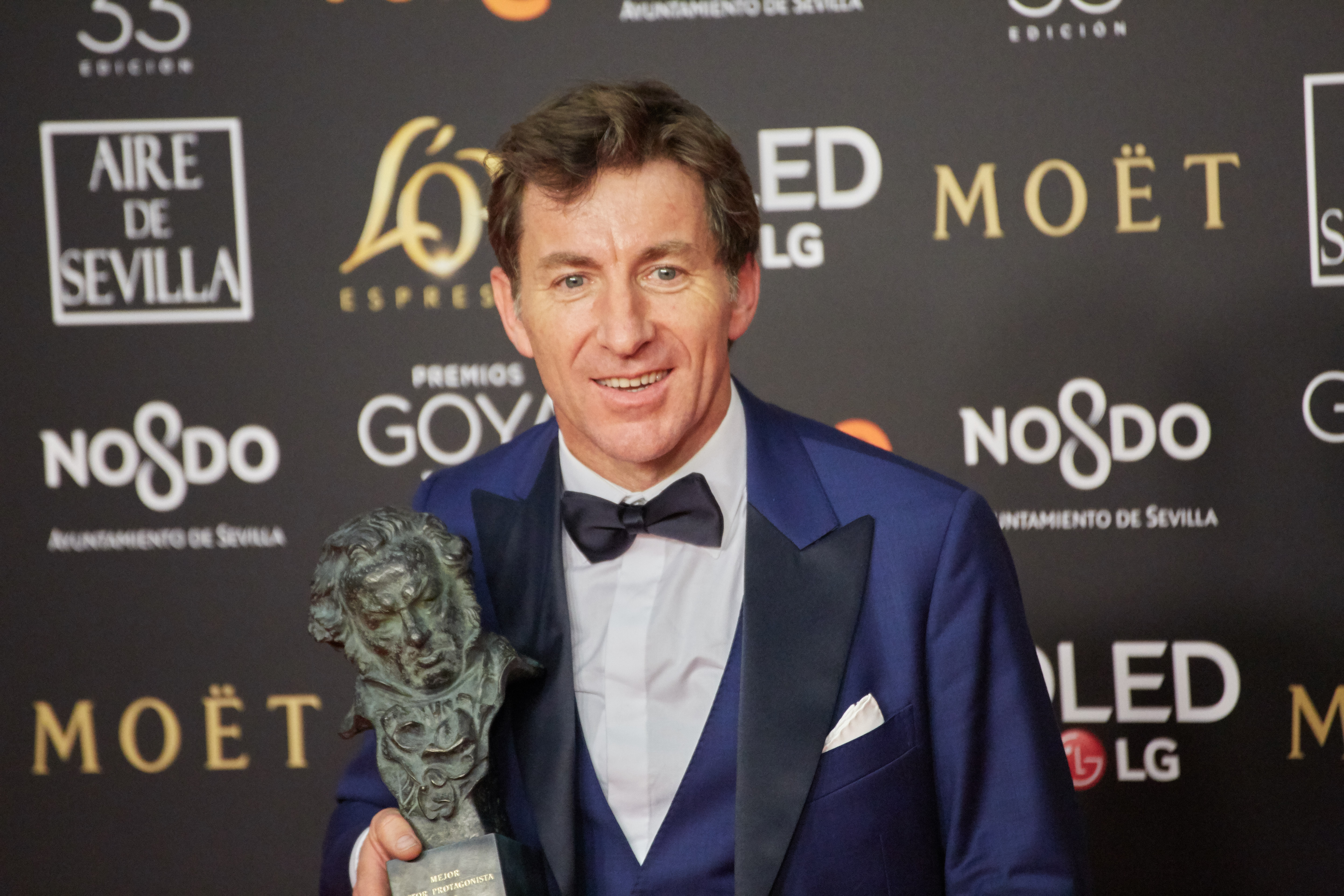 Antonio de la Torre exhibiendo su Goya a la Mejor Interpretación Masculina Portagonista por El Reino